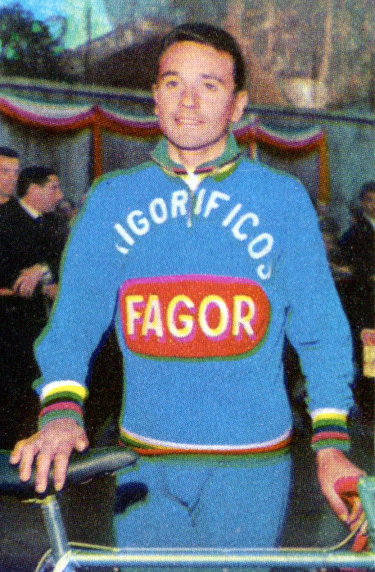 Nuova CAMPIONI DELLO SPORT 1967/68 Figurina/Sticker -n. 269 - JAIME ALOMAR -Rec